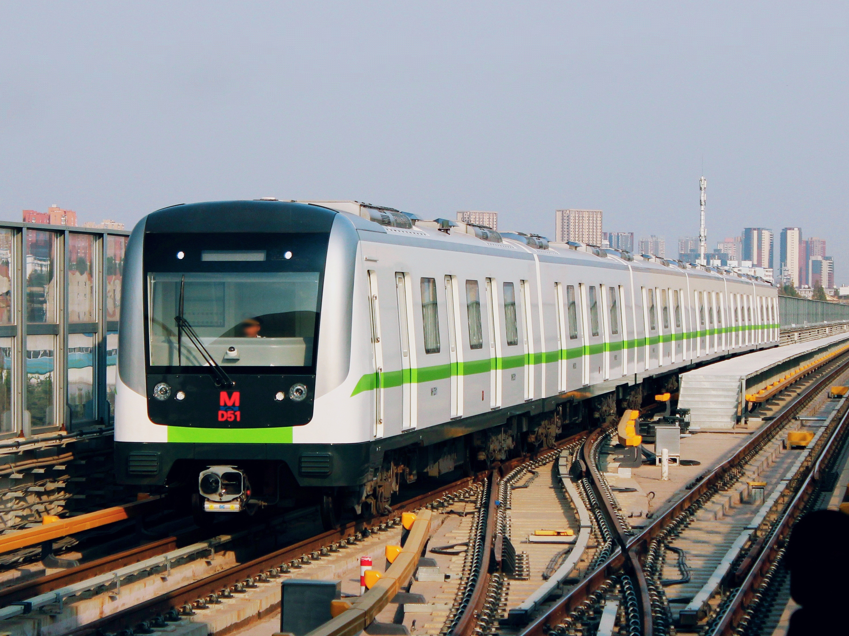 中文（中国大陆）: 武汉地铁4号线D51号车，摄于柏林站。